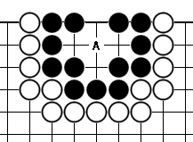 中文（台灣）: 梅花五(圍棋)